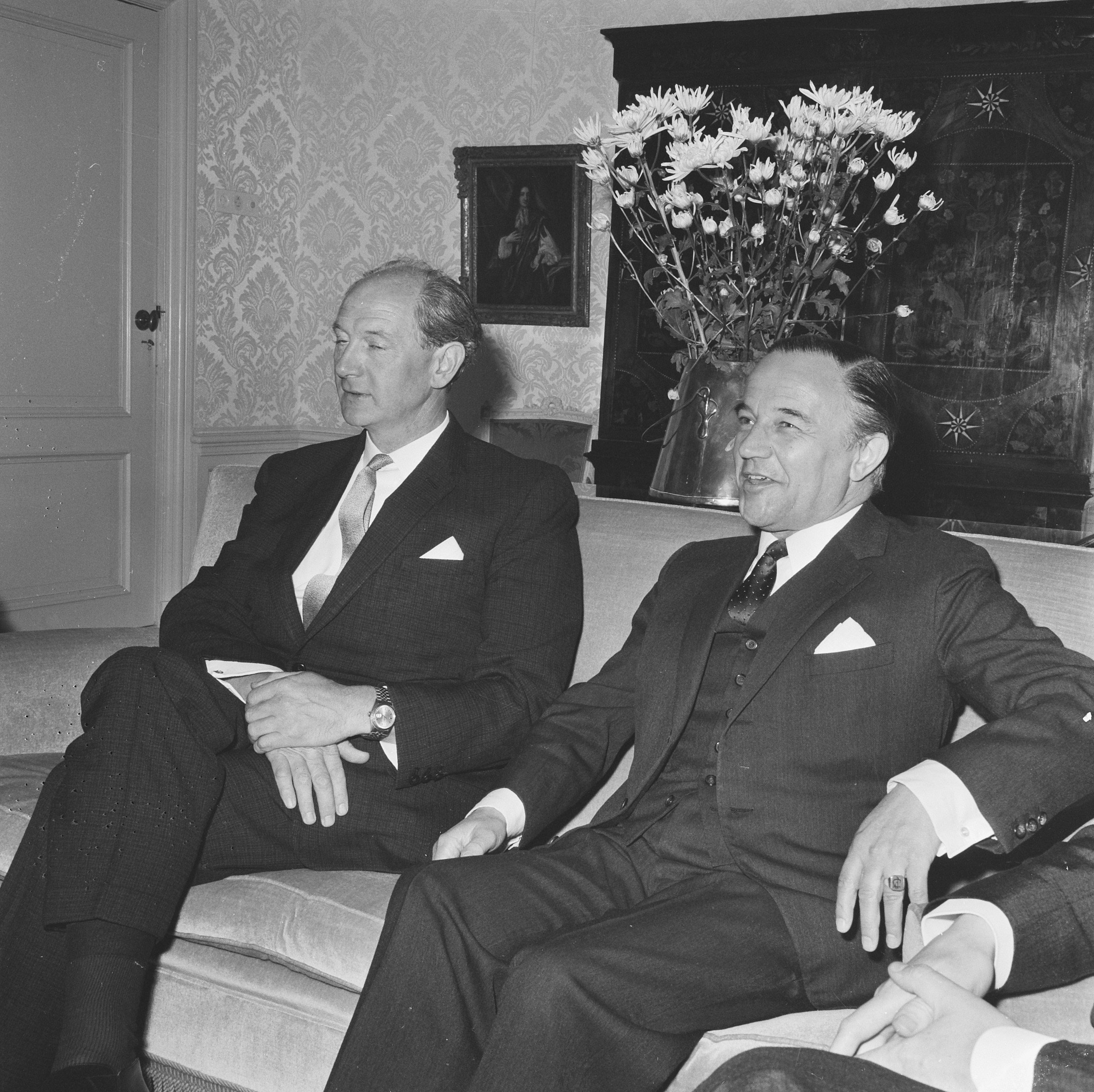 Collectie / Archief : Fotocollectie Anefo Reportage / Serie : Premier De Jong ontvangt de Ierse minister-president Jack Lynch te Den Haag Beschrijving : Minister-president Jack Lynch (links) en premier Piet de Jong Annotatie : John Mary "Jack" Lynch was minister-president van Ierland in de jaren 1966 – 1973 en 1977 – 1979 Datum : 22 juni 1967 Locatie : Den Haag, Zuid-Holland Trefwoorden : ministers-presidenten, ontvangsten Persoonsnaam : Jong, Piet de, Lynch, J.M. Fotograaf : Evers, Joost / Anefo Auteursrechthebbende : Nationaal Archief Materiaalsoort : Negatief (zwart/wit) Nummer archiefinventaris : bekijk toegang 2.24.01.03 Bestanddeelnummer : 920-4280